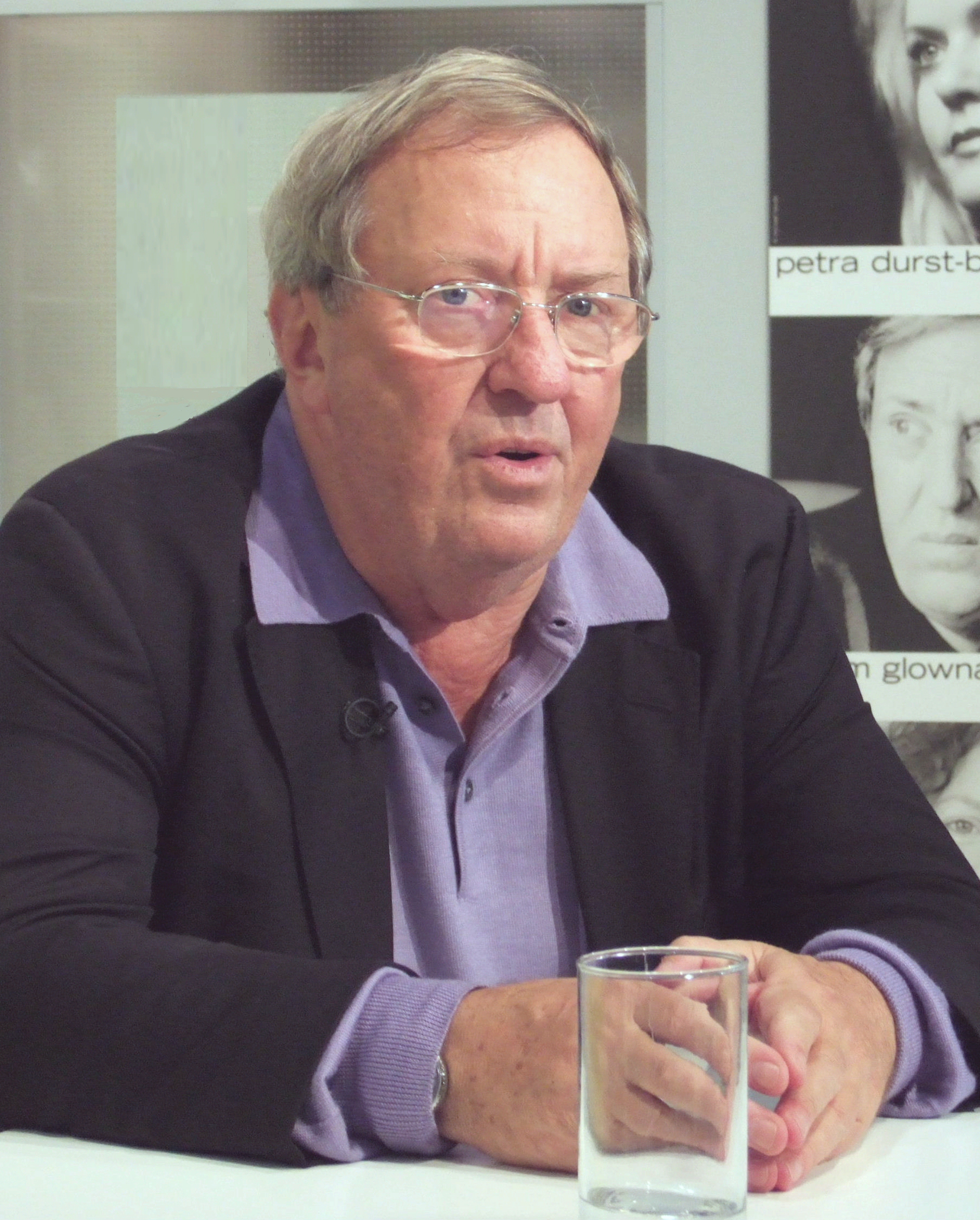 Vadim Glowna Aufnahme: 6.10.2006 Url